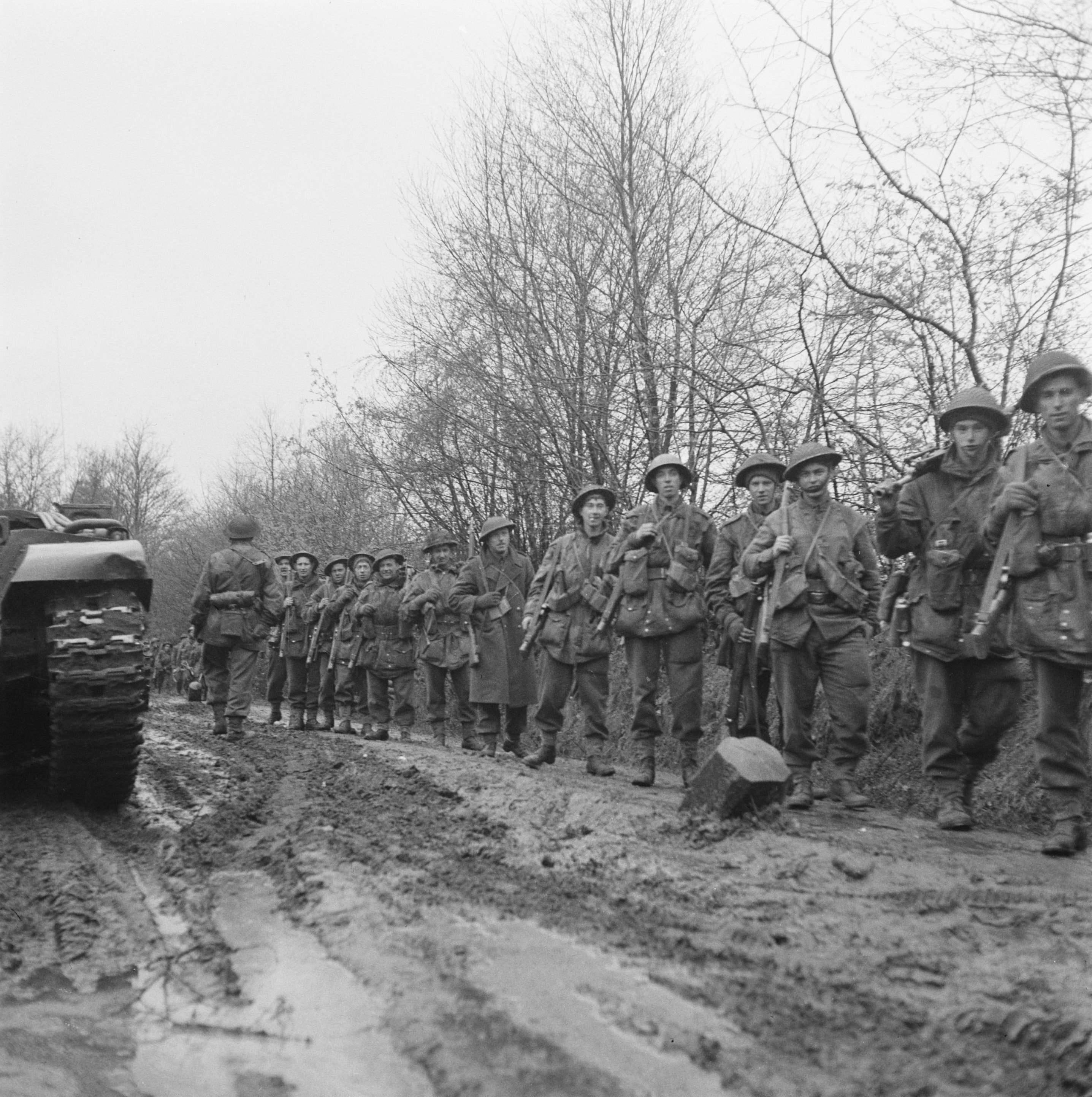 Collectie / Archief : Fotocollectie Anefo Reportage / Serie : Front Noord-Oost Nederland: Enschede - Hengelo [strijd en bevrijding Achterhoek (1 april 1945), Enschede (1 april 1945), Hengelo (3 april 1945)] Beschrijving : Britse soldaten van het Seventh Hampshire Regiment rukken op van Enschede naar Hengelo via Driene. Datum : 3 april 1945 Locatie : Overijssel, Twente Trefwoorden : bevrijding, gevechten, militairen, tweede wereldoorlog Fotograaf : Fotograaf Onbekend / Anefo, [onbekend] Auteursrechthebbende : Nationaal Archief Materiaalsoort : Negatief (zwart/wit) Nummer archiefinventaris : bekijk toegang 2.24.01.03 Bestanddeelnummer : 900-2374